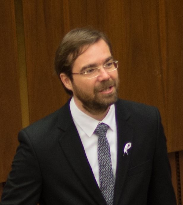 Marek Krajčí skladá poslanecký sľub.